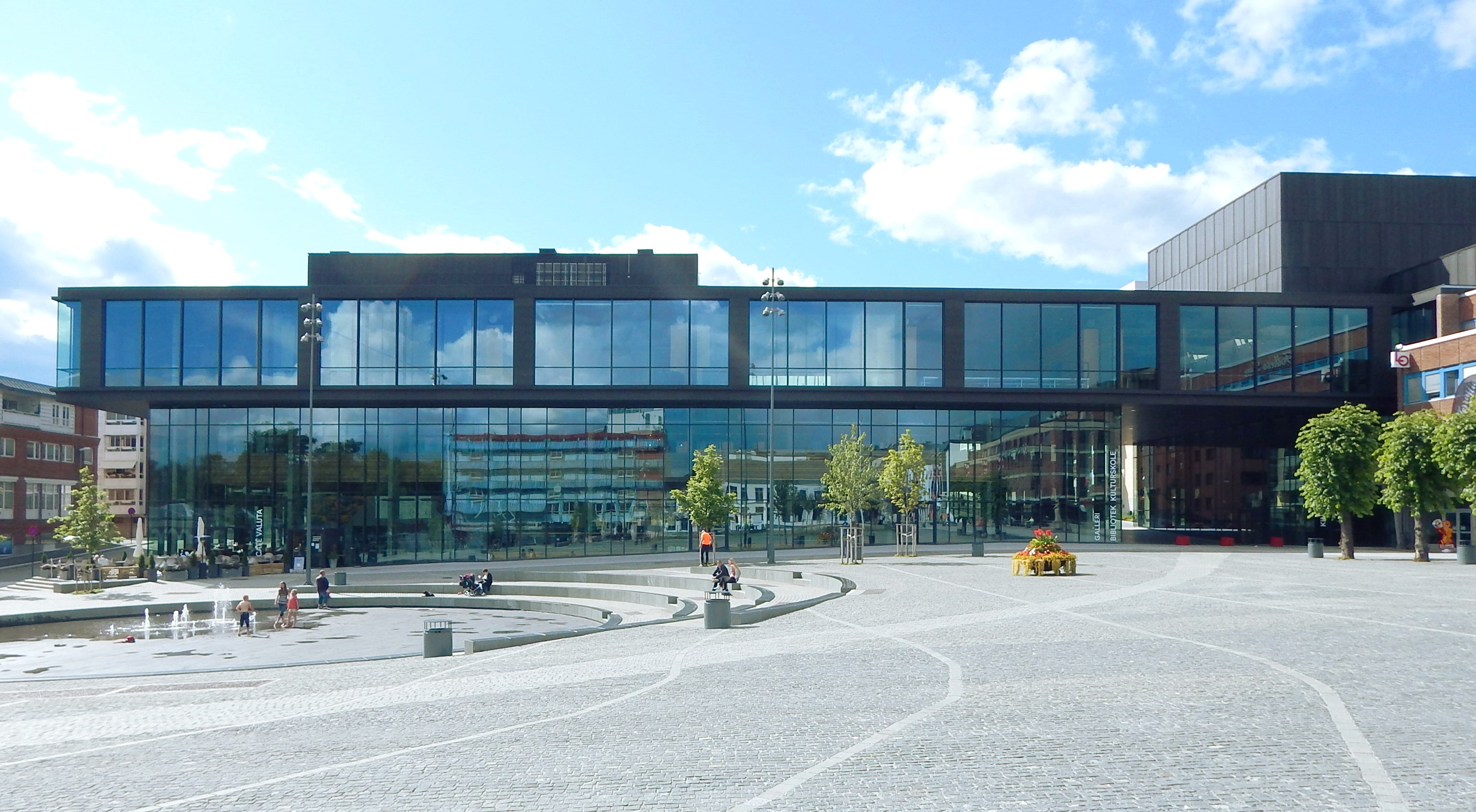 Hamar kulturhus